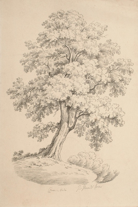 "Quercia verde", matita su carta, 42,5 x 28,5 cm., collezione privata